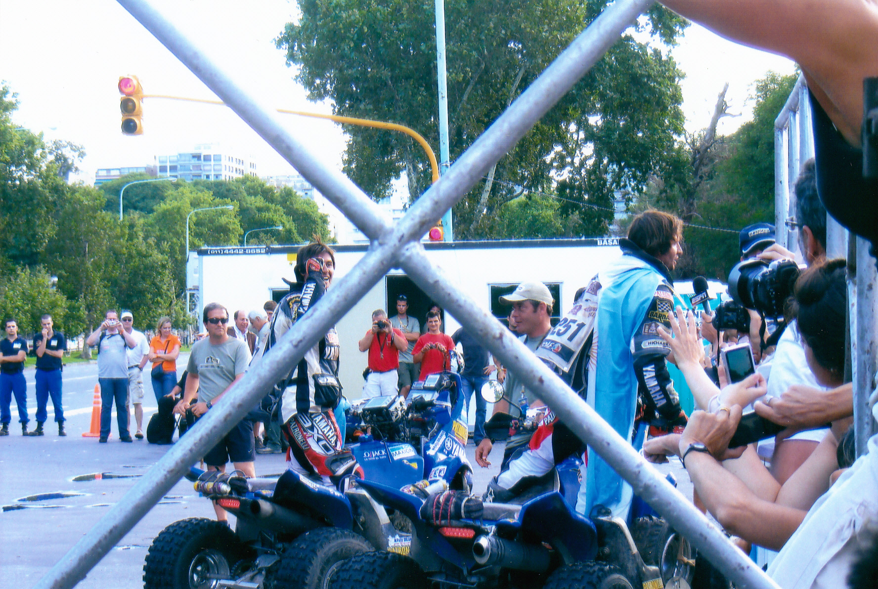 Die Brüder Marcos und Alejandro Patronelli, die Sieger der Rallye Dakar 2010 (Quads)